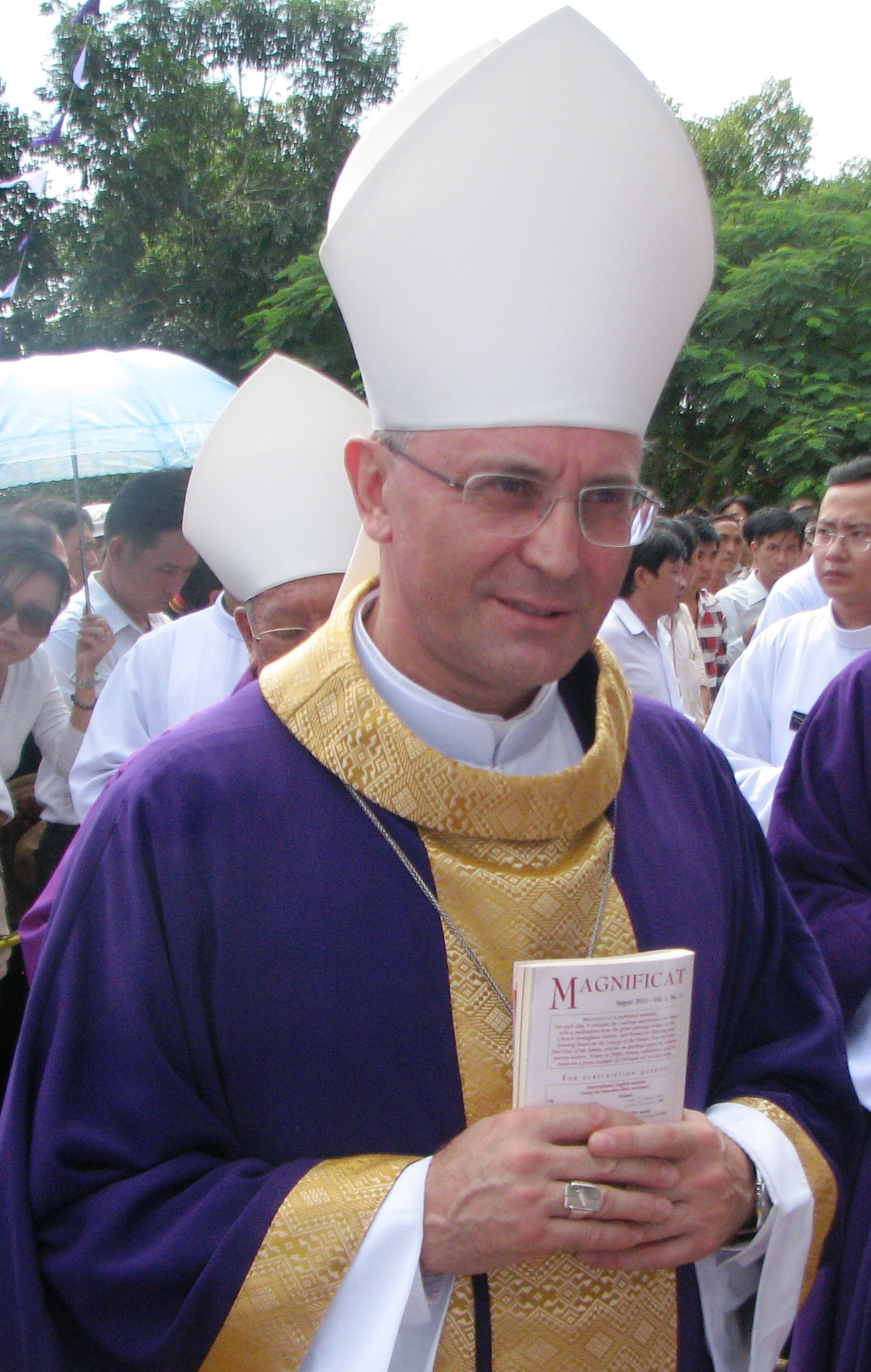 Hồng y Leopoldo Girelli, đại diện tòa thánh tại Viet Nam.